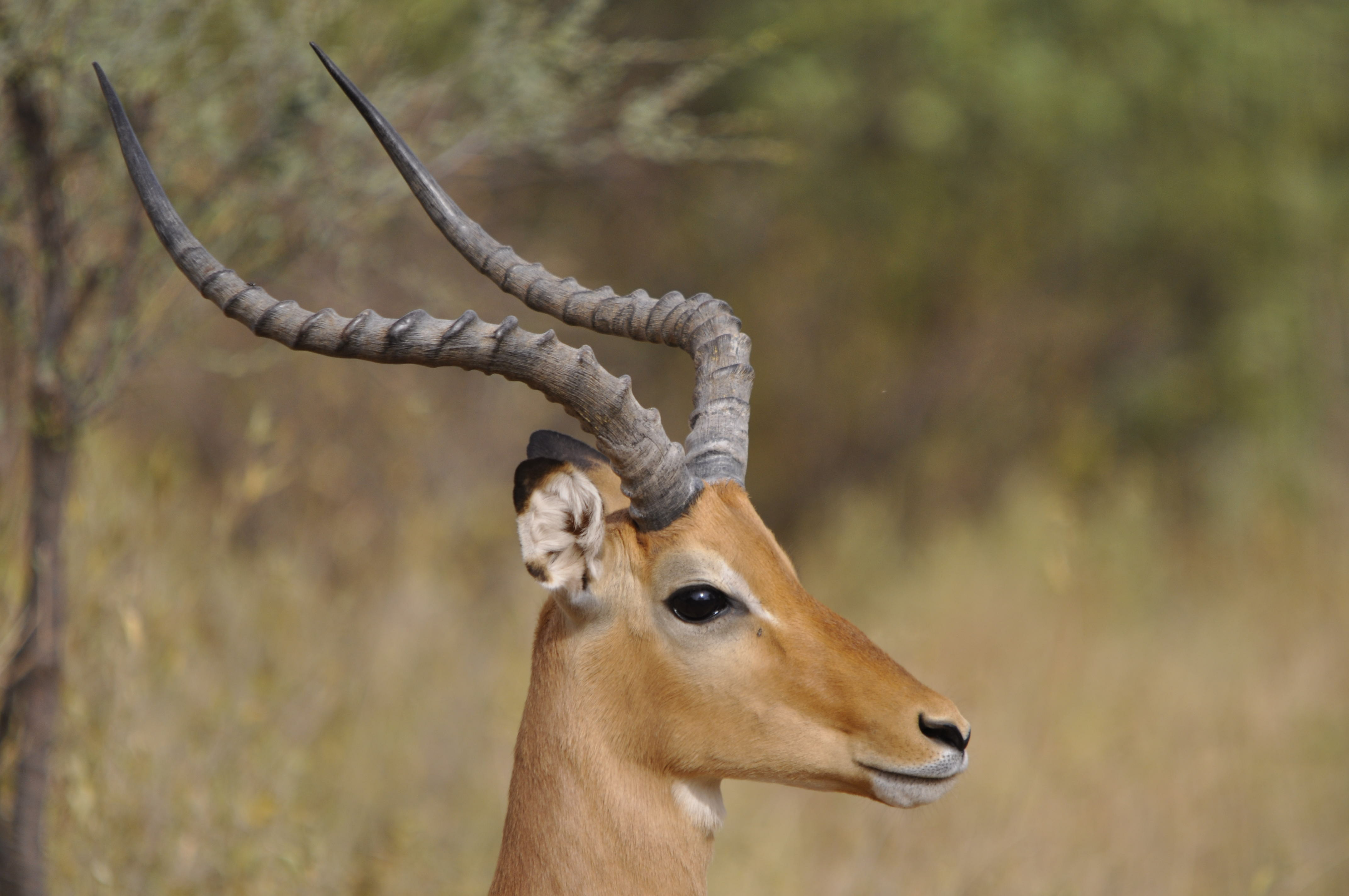 Impala nel Samburu Park